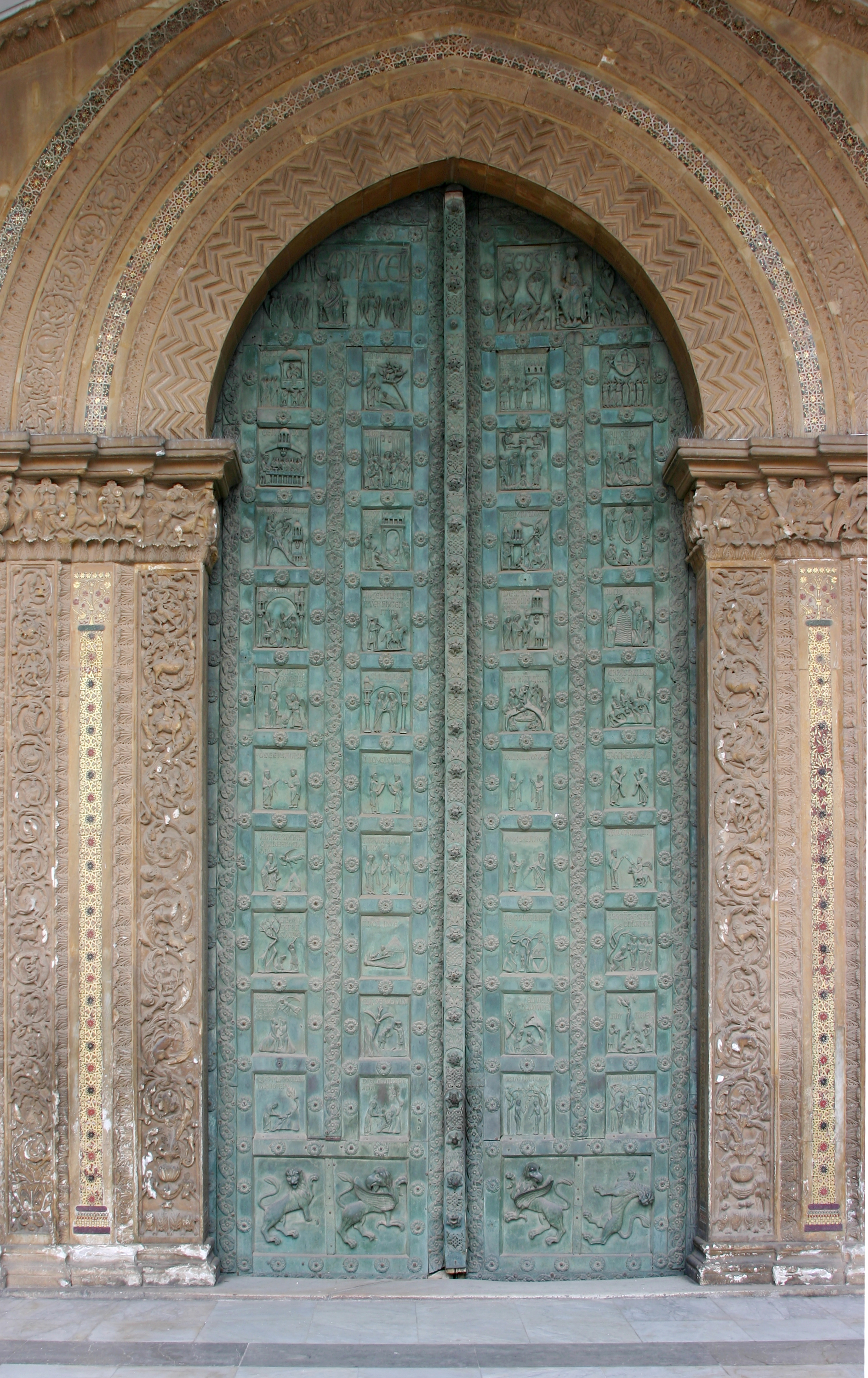 Cathedral of Monreale